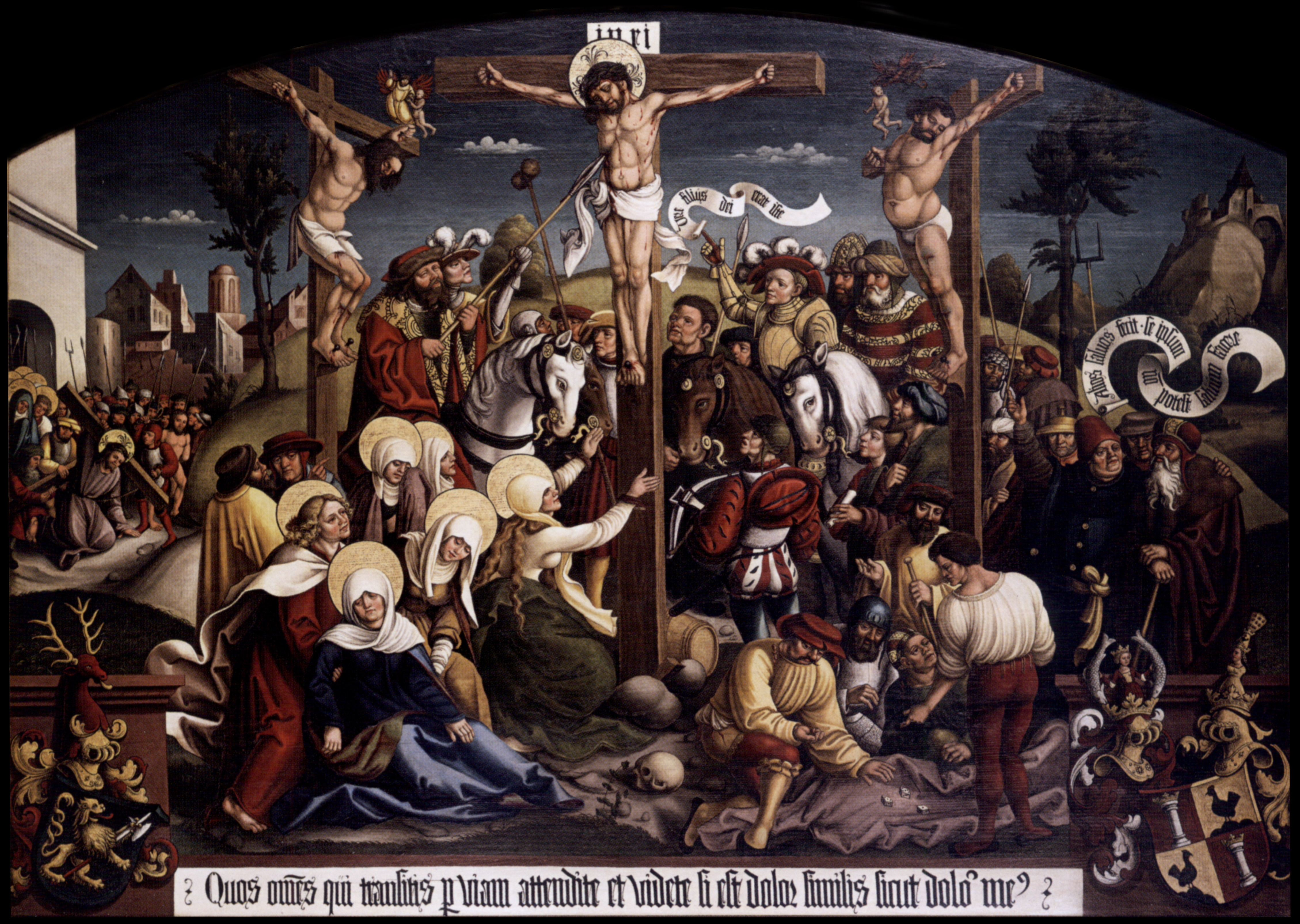 Die Kreuzigung Christi. Wohl Werkstatt von Hans und Jakob Strüb, 1518. Öl auf Tannenholz, 183 x 235 cm mit Segmentbogenabschluss. Rahmen hier aus urheberrechtlichen Gründen entfernt. Wappen von Gottfried Werner von Zimmern und Apollonia von Henneberg. Möglicherweise für Burg Wildenstein bestimmt. Sammlung Würth, Schwäbisch Hall.